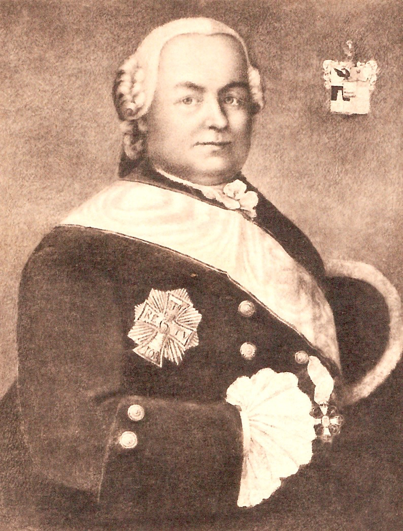 Frederik Adeler (1700-1766), fra Dansk Adels Aarbog, 1911